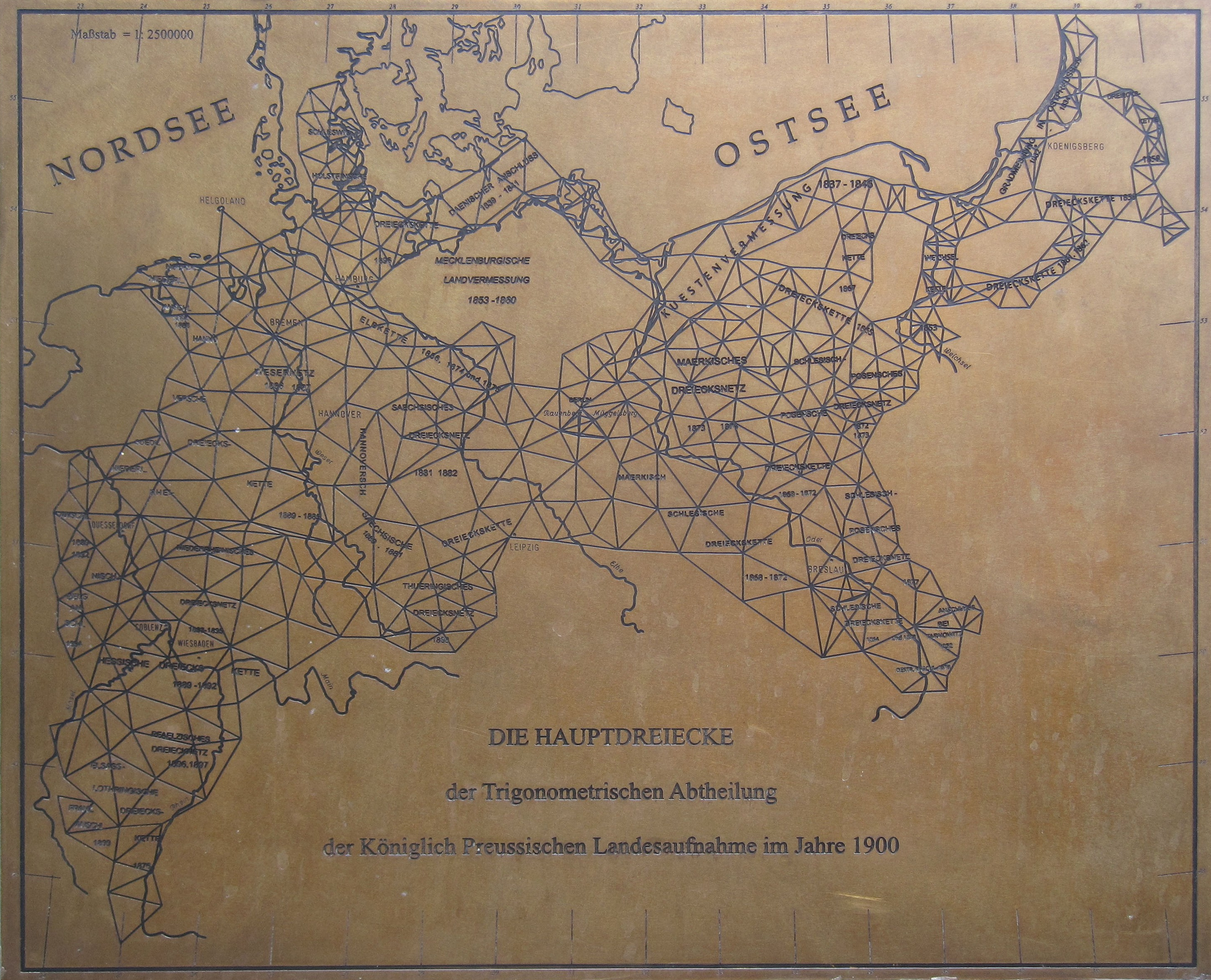 Ansicht des Denkmals TP Rauenberg in Berlin-Tempelhof, Netz Triangulation Preußen